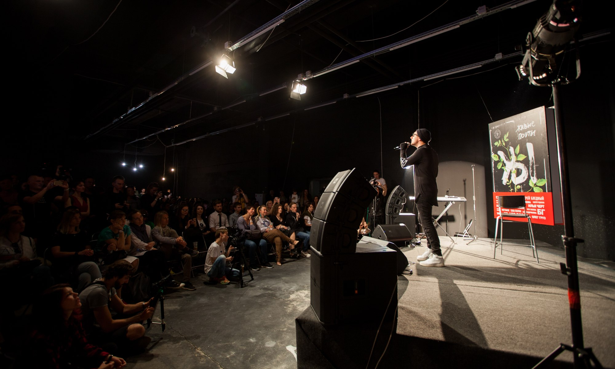 Андрей Орловский на фестивале "вЖЫвую", 2018 год